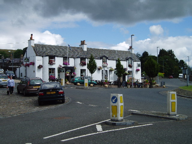 Clovenfords